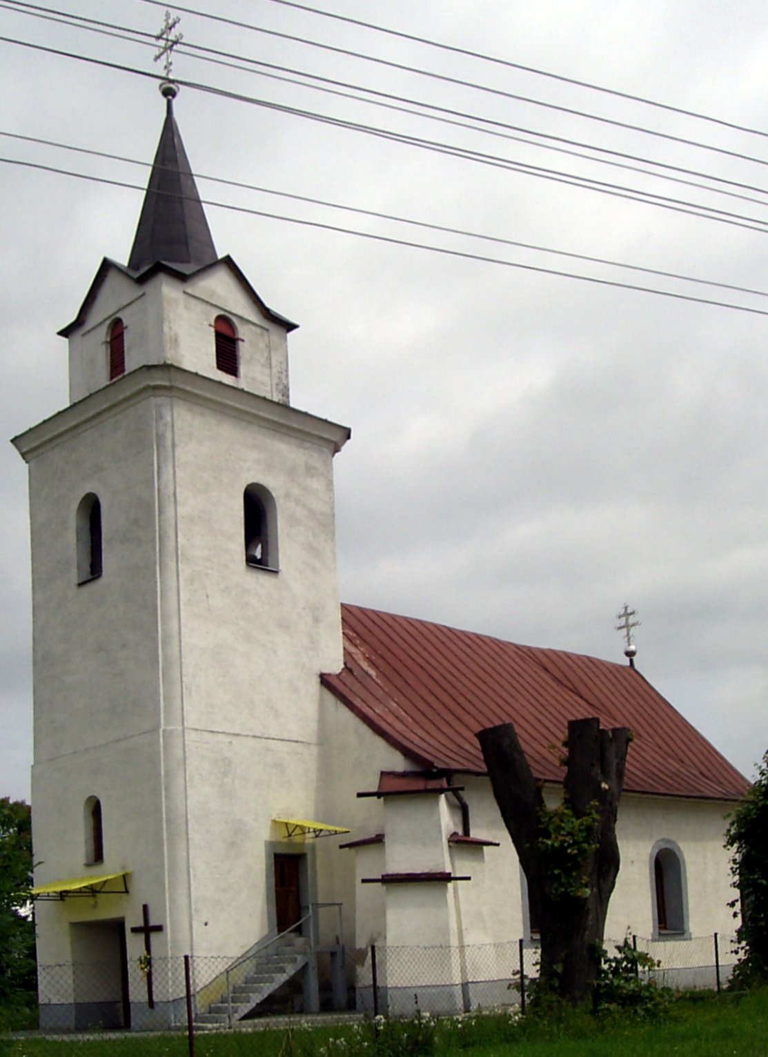 Voľa, Grécko-katolícky kostol